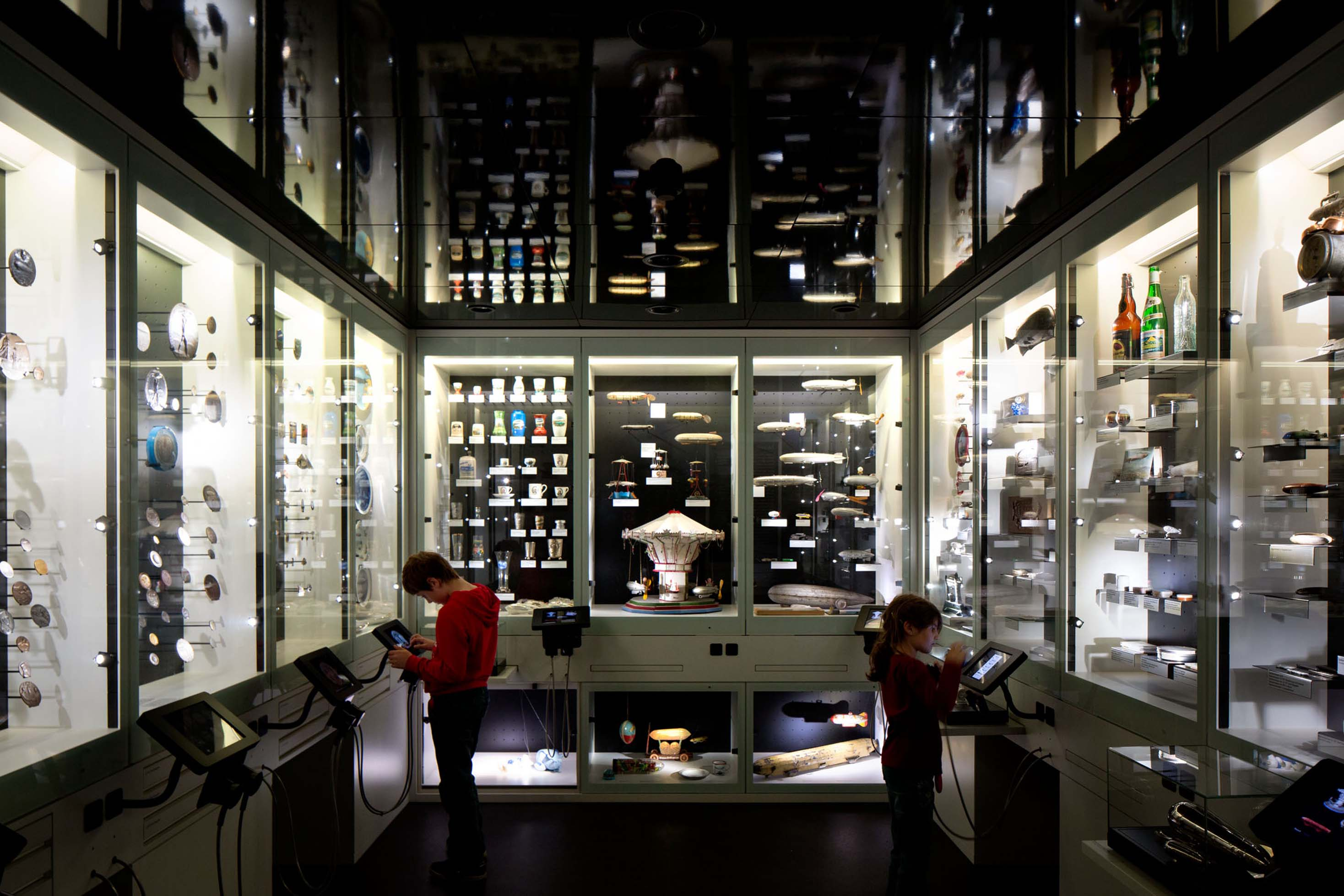 Zeppelin-Wunderkammer, © Zeppelin Museum, Foto: Myrzik